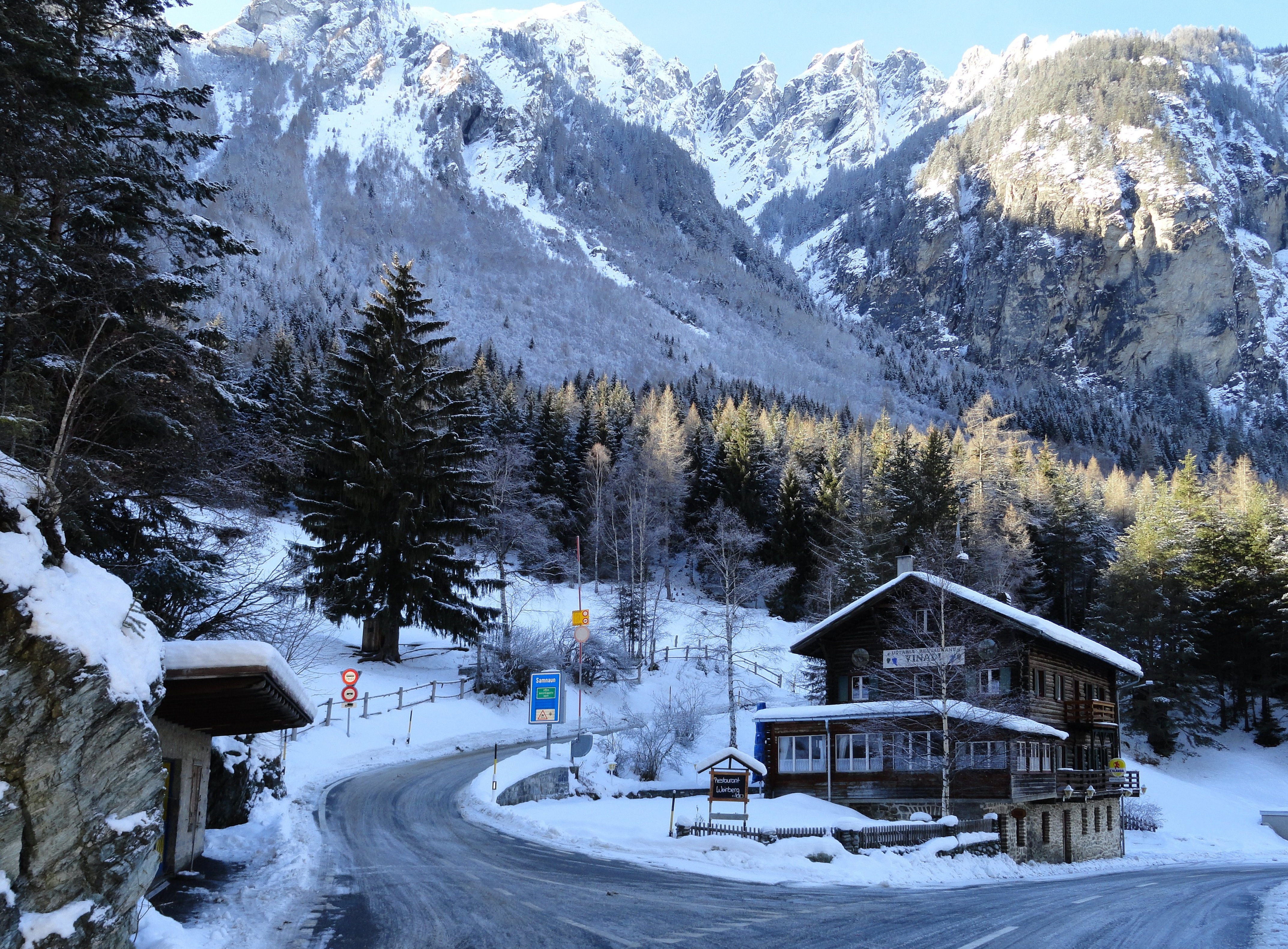 Vinadi